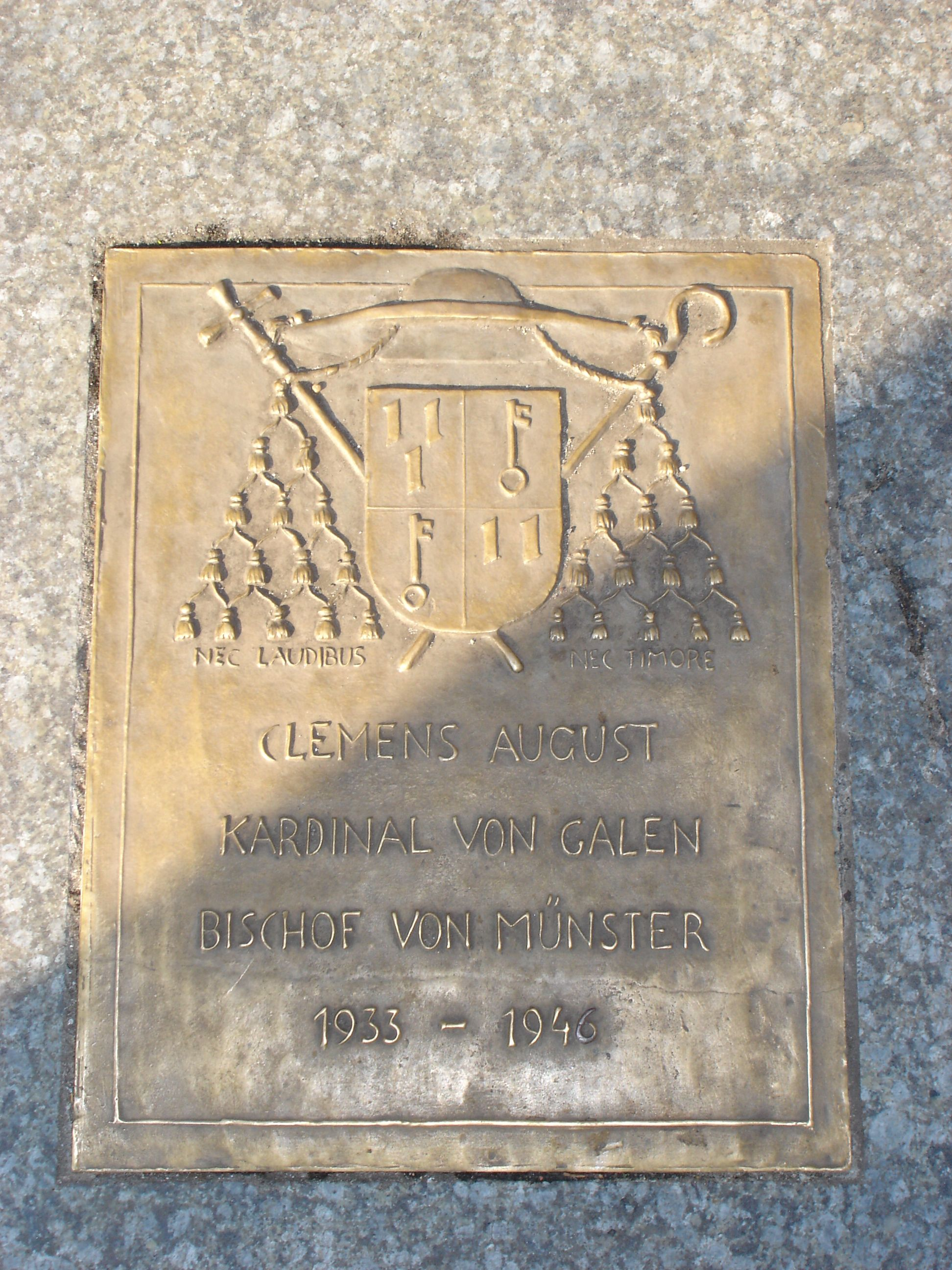 Bodenplatte am Dankmal von Clemens August Graf von Galen am nordöstlichen Ende des Domplatzes in Münster